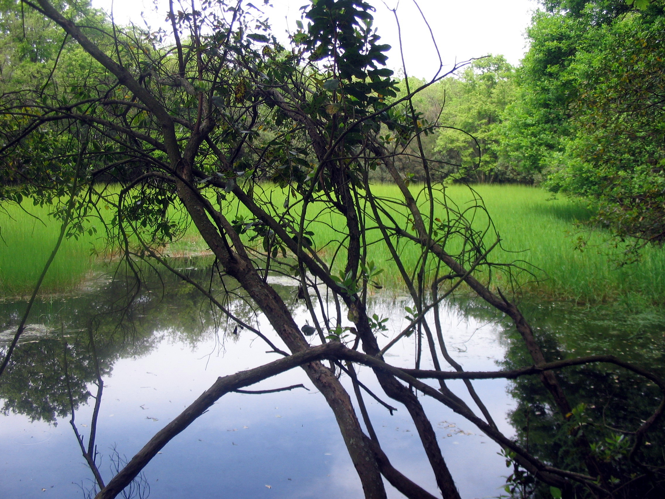 Parco Decima Malafede, Roma, Italia